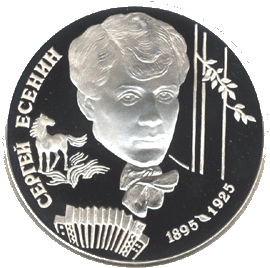 Монета Банка России — Серия: «Выдающиеся личности России», 100-летие со дня рождения С.А. Есенина, 2 рубля, реверс.